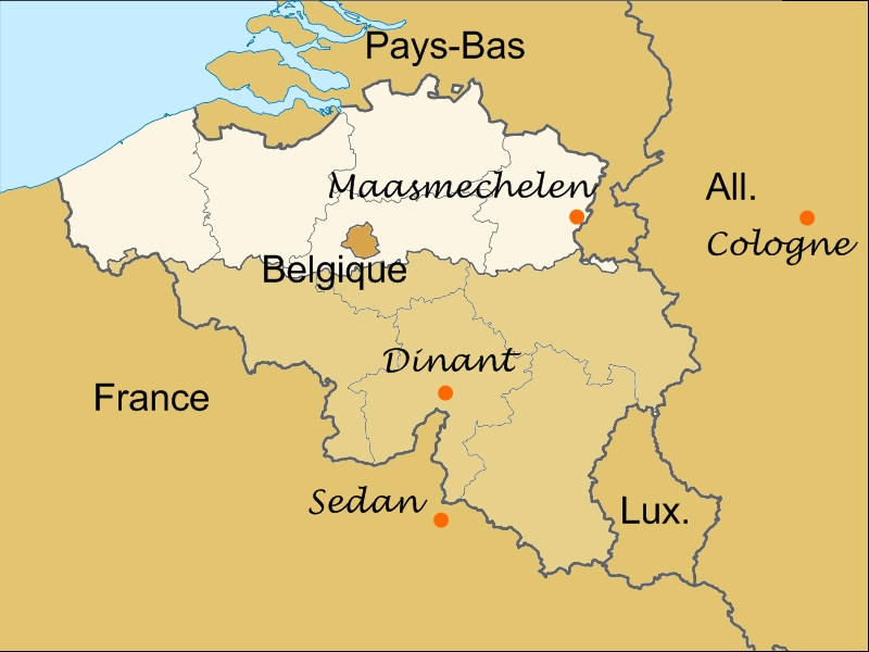 Carte de la Belgique situant les différentes villes citées dans l'article sur l'accident de Mechelen devenue Maasmechelen